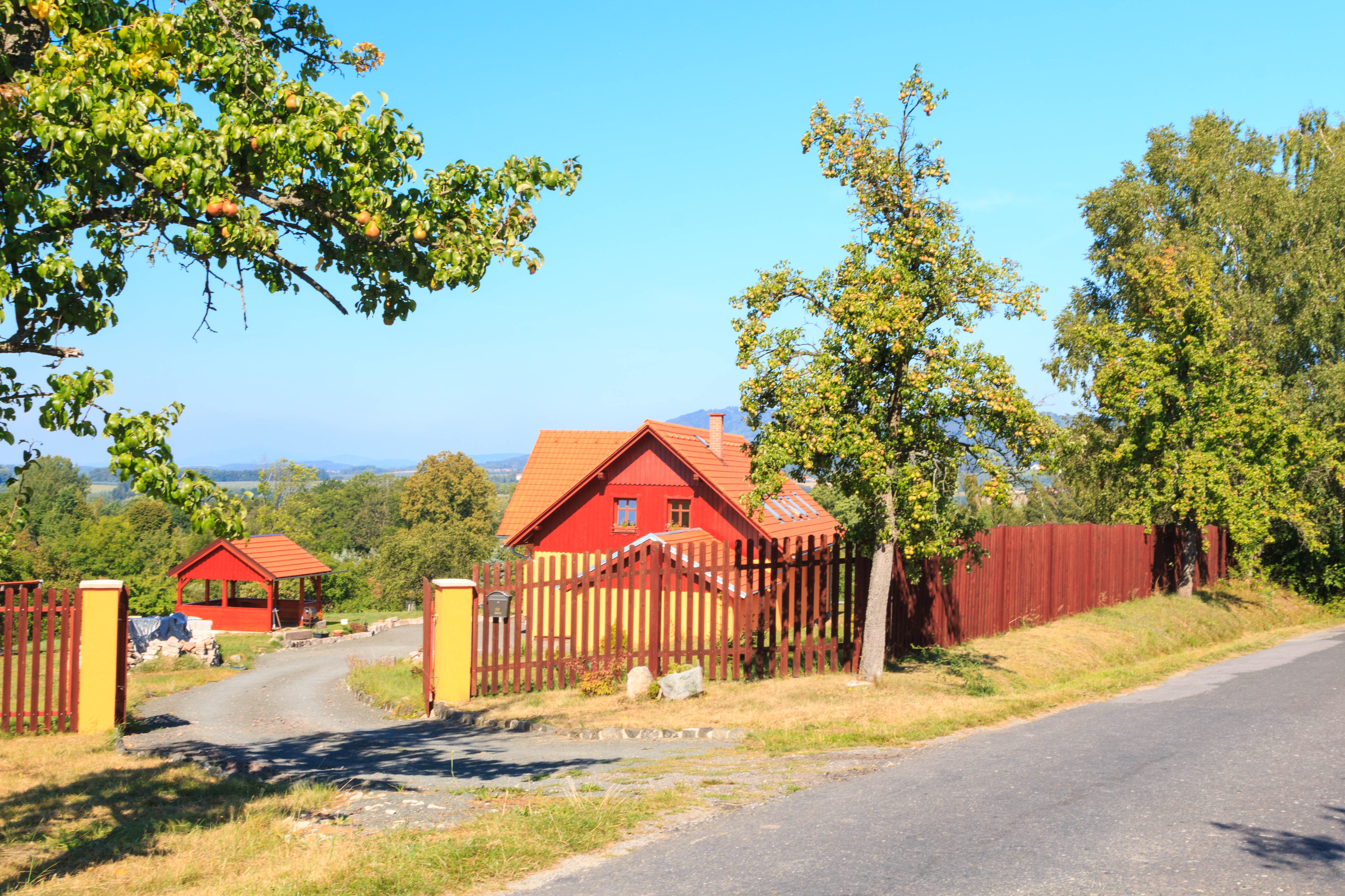 Žďár u Veselé - čp. 25